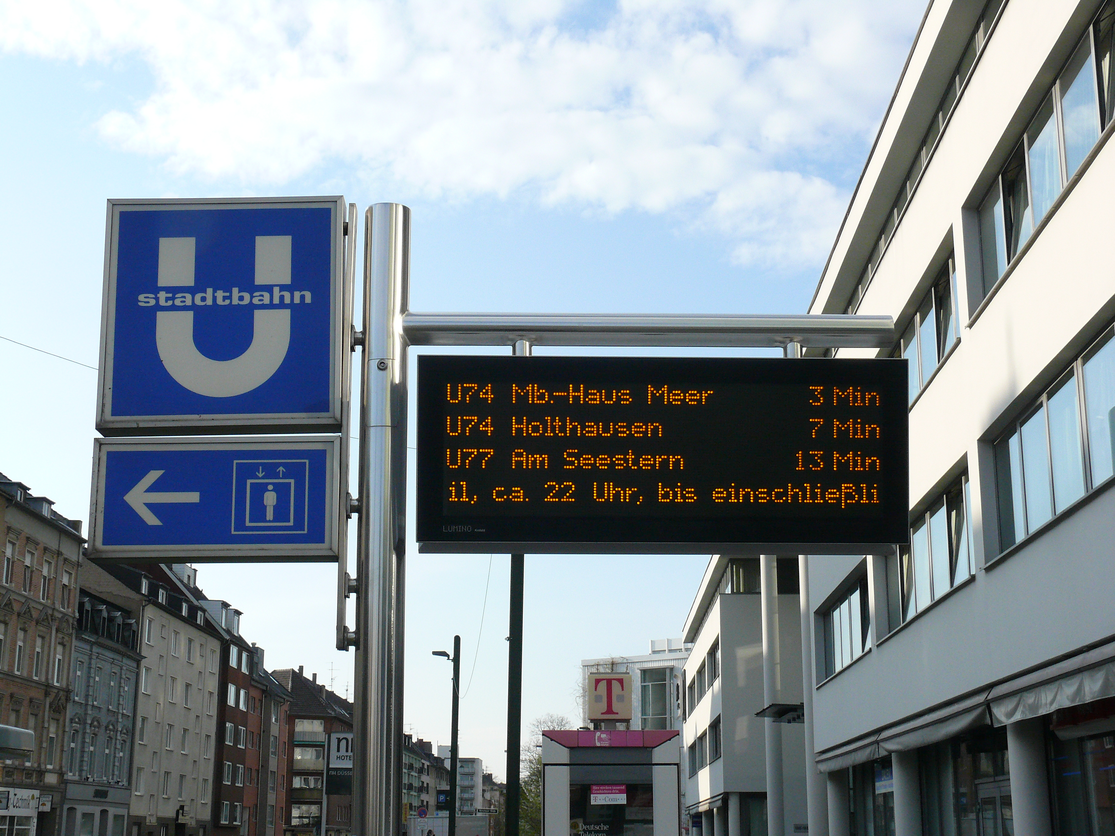 Zeitanzeige am U-Bahnhof Oberbilker Markt (Ostseite)